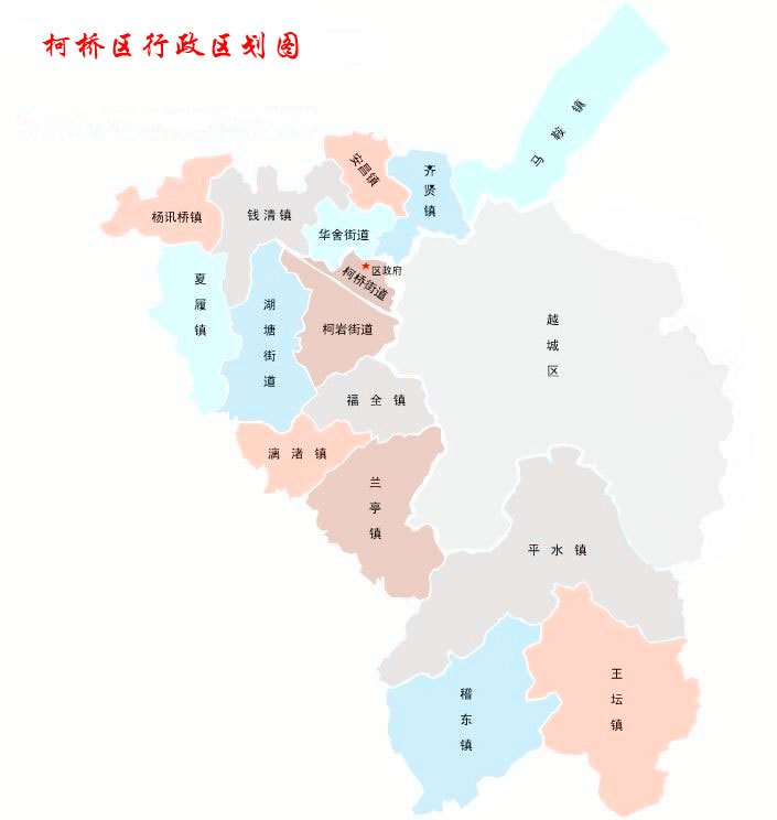 柯桥区行政区划图